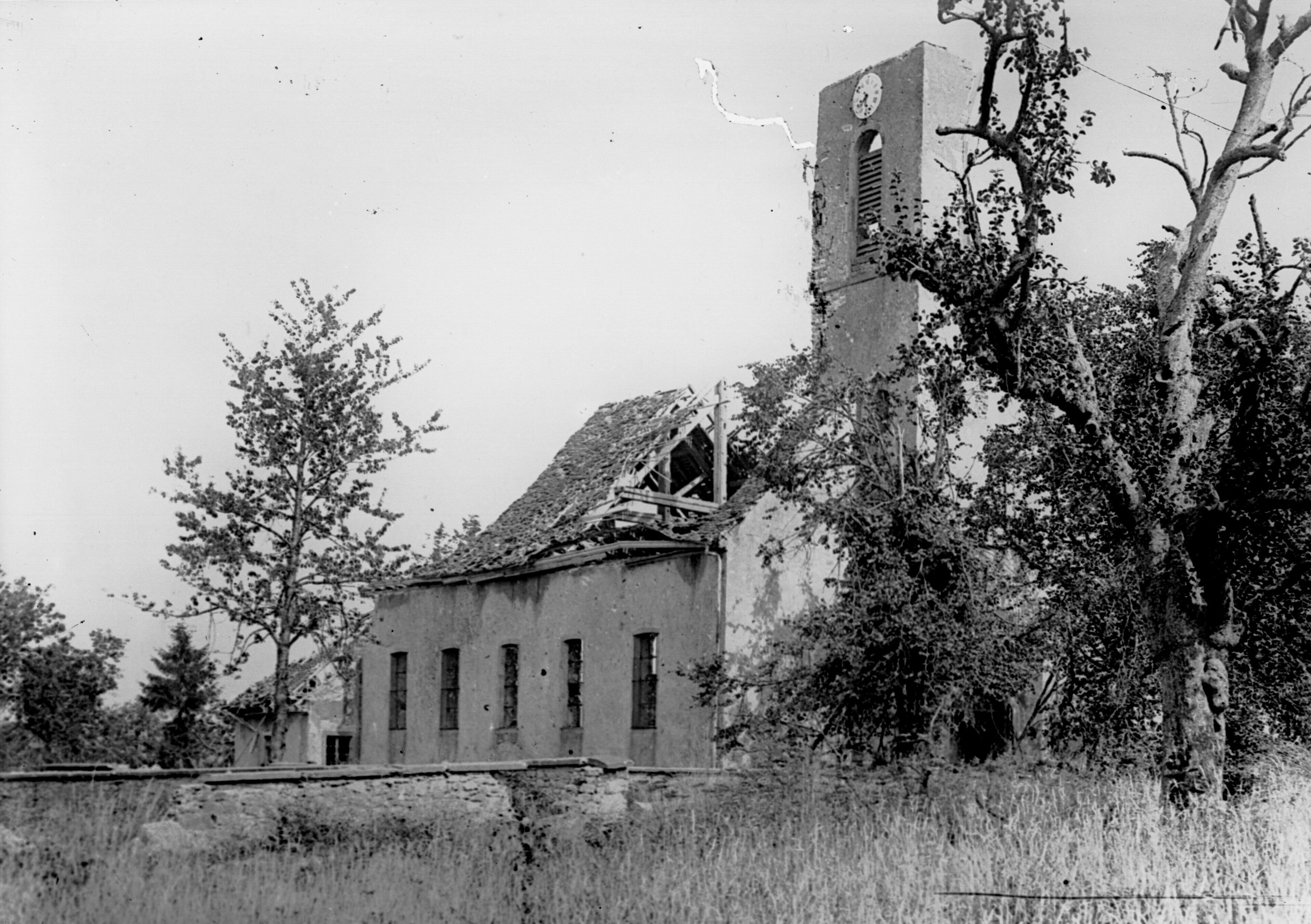 Eglise de Seppois-le-Bas (Haut-Rhin)